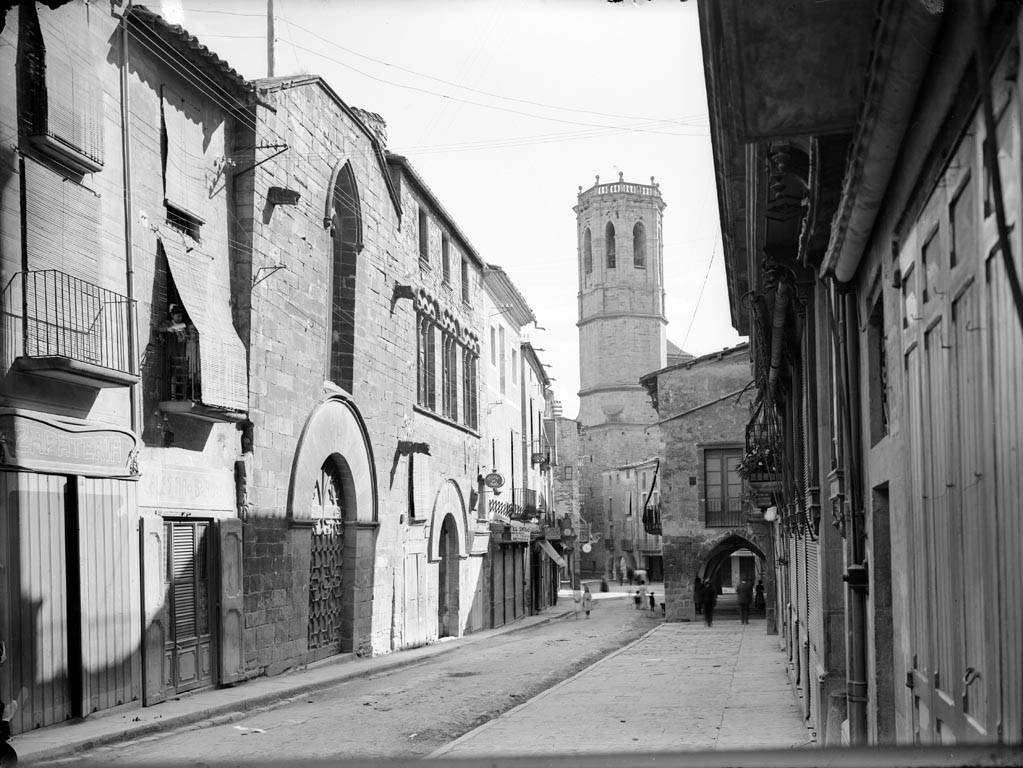 Imatge